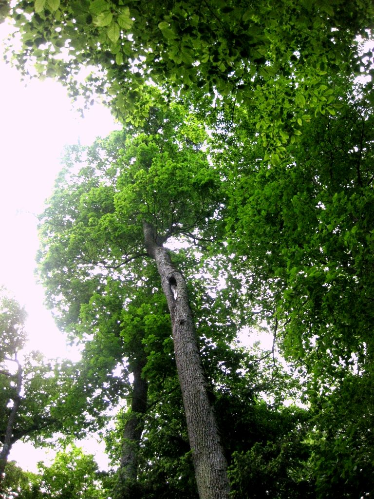 Բելովեժյան անտառից